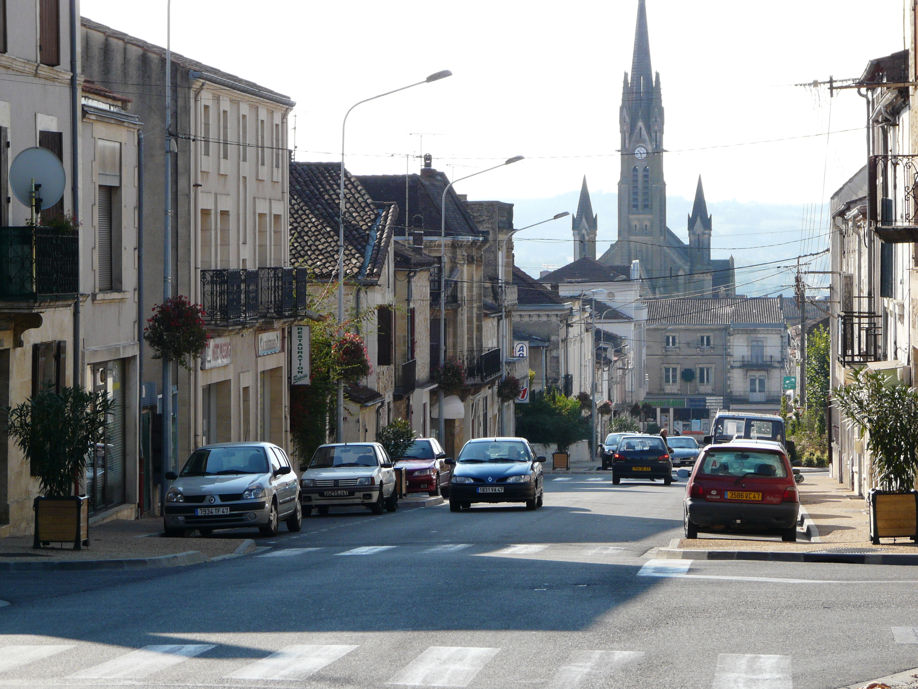 Une rue de Fumel